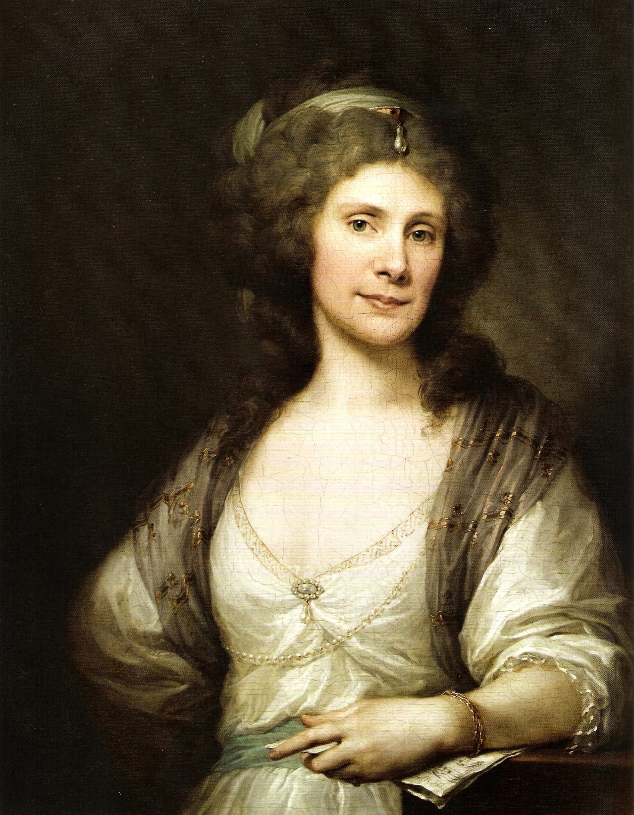 Józefina Amalia Potocka